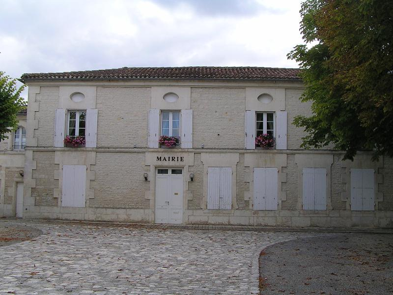 Mairie de Sigogne